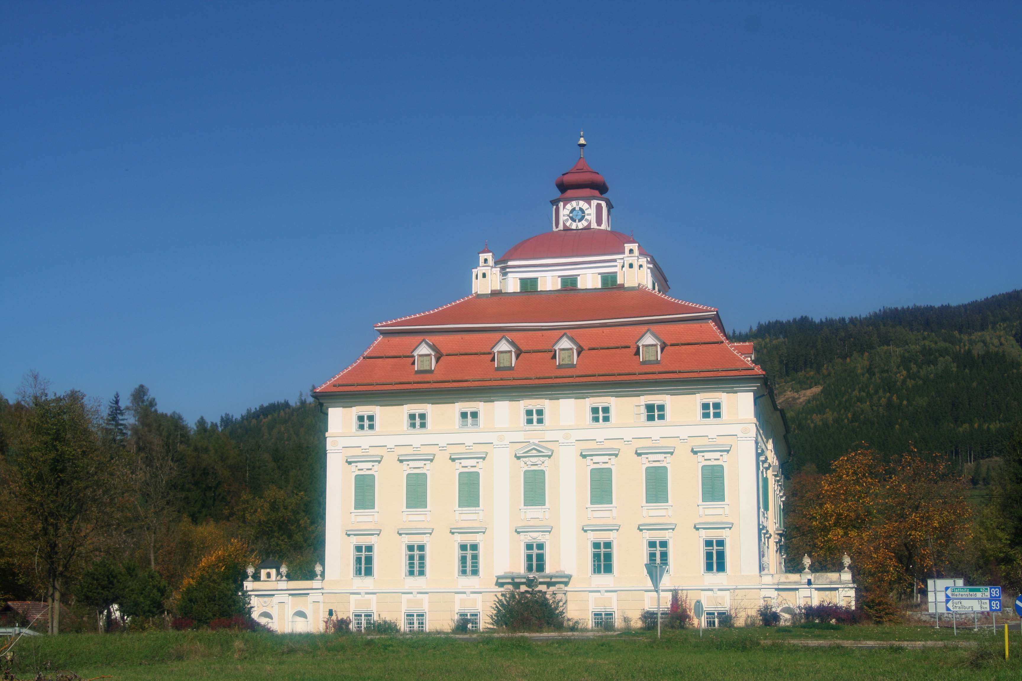 Schloss Pöckstein, Straßburg, Kärnten